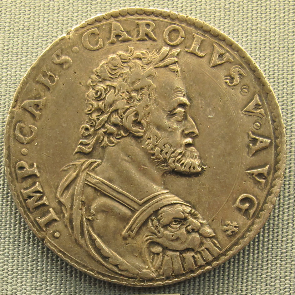 Milano, ducatone da soldi 100 di carlo V, 1535-1556